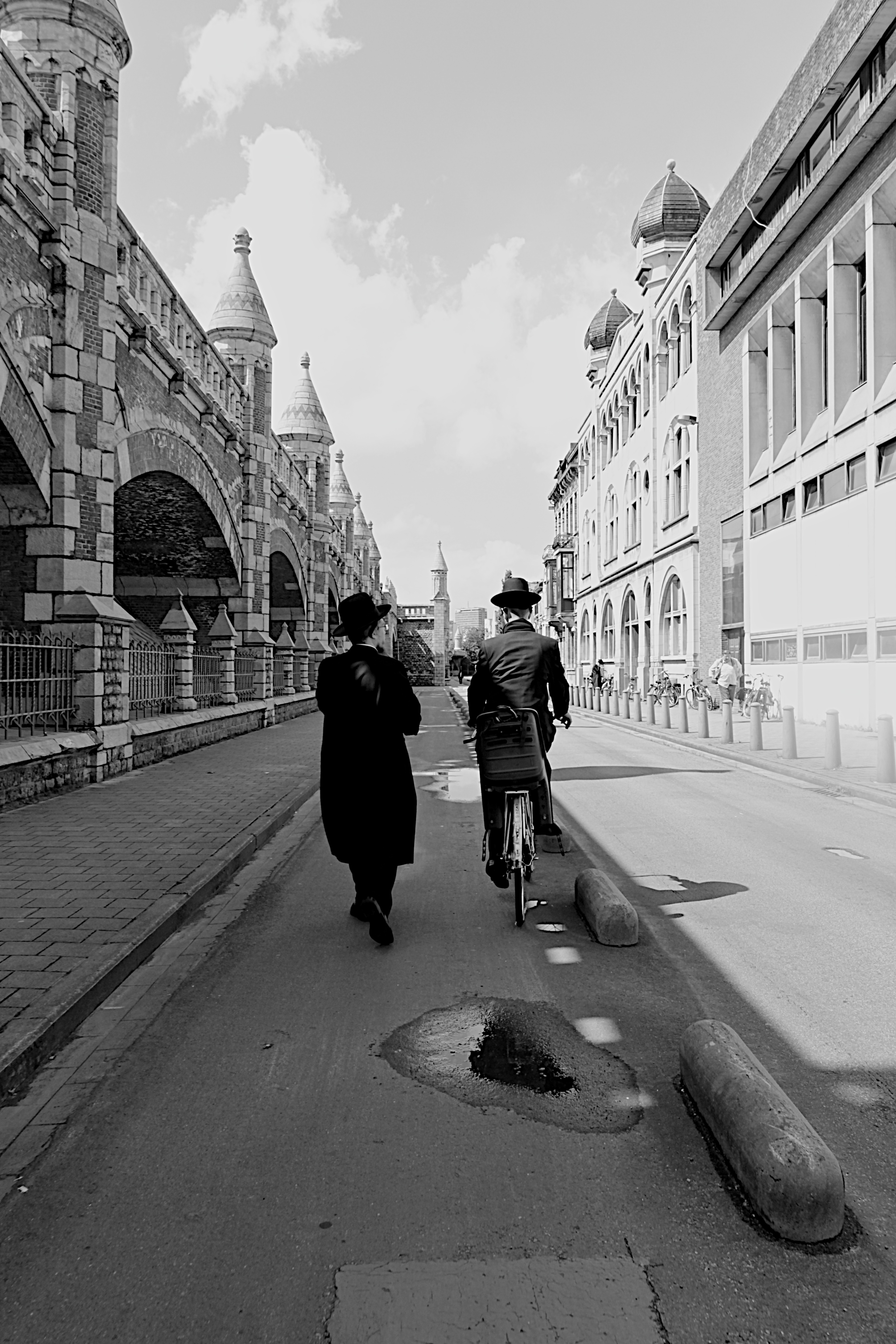 Jewish Quarter (Anvers, Belgique)